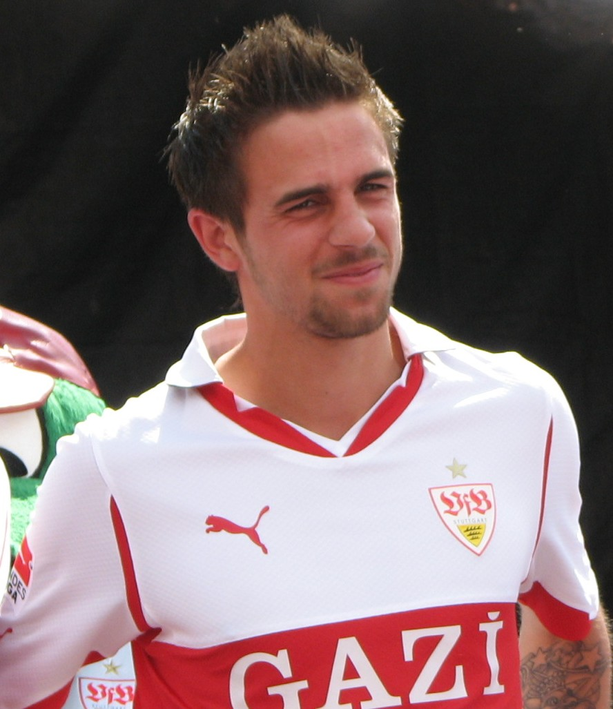 Martin Harnik beim Saison-Opening 2010 des VfB Stuttgart. Aufgenommen von